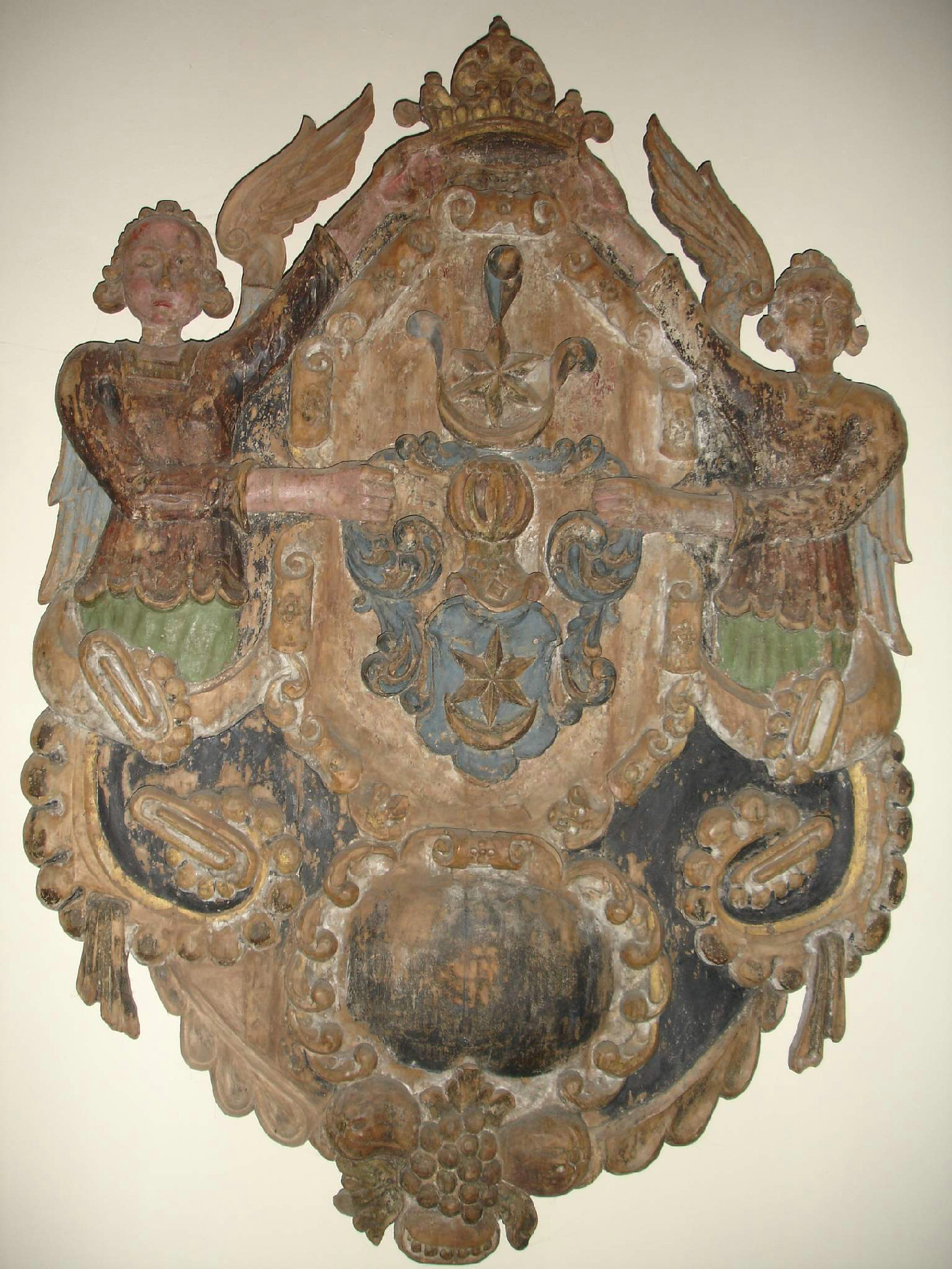 Leliwa CoA, Sulkowski castle, Bielsko-Biała